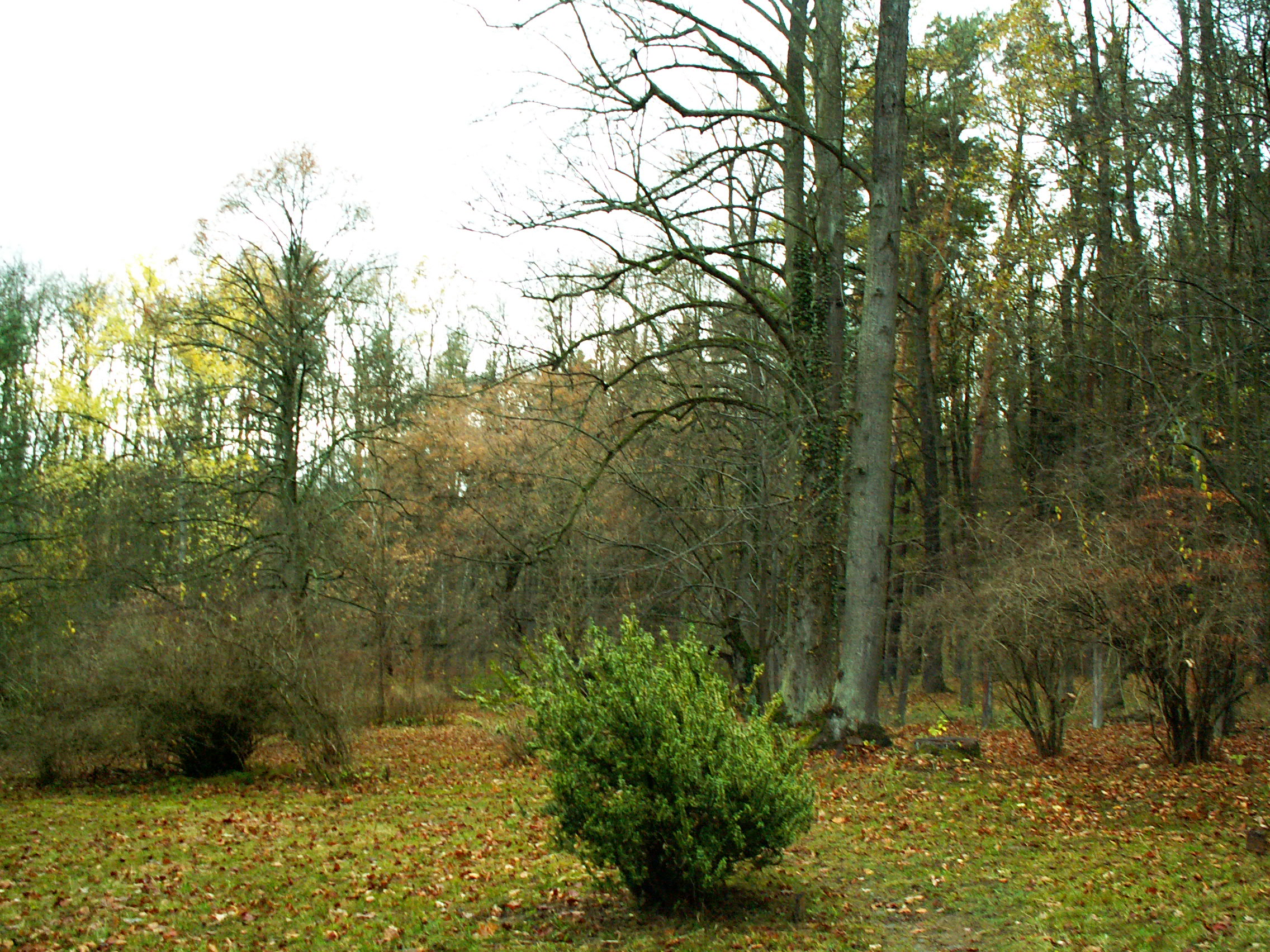 a. zahrada